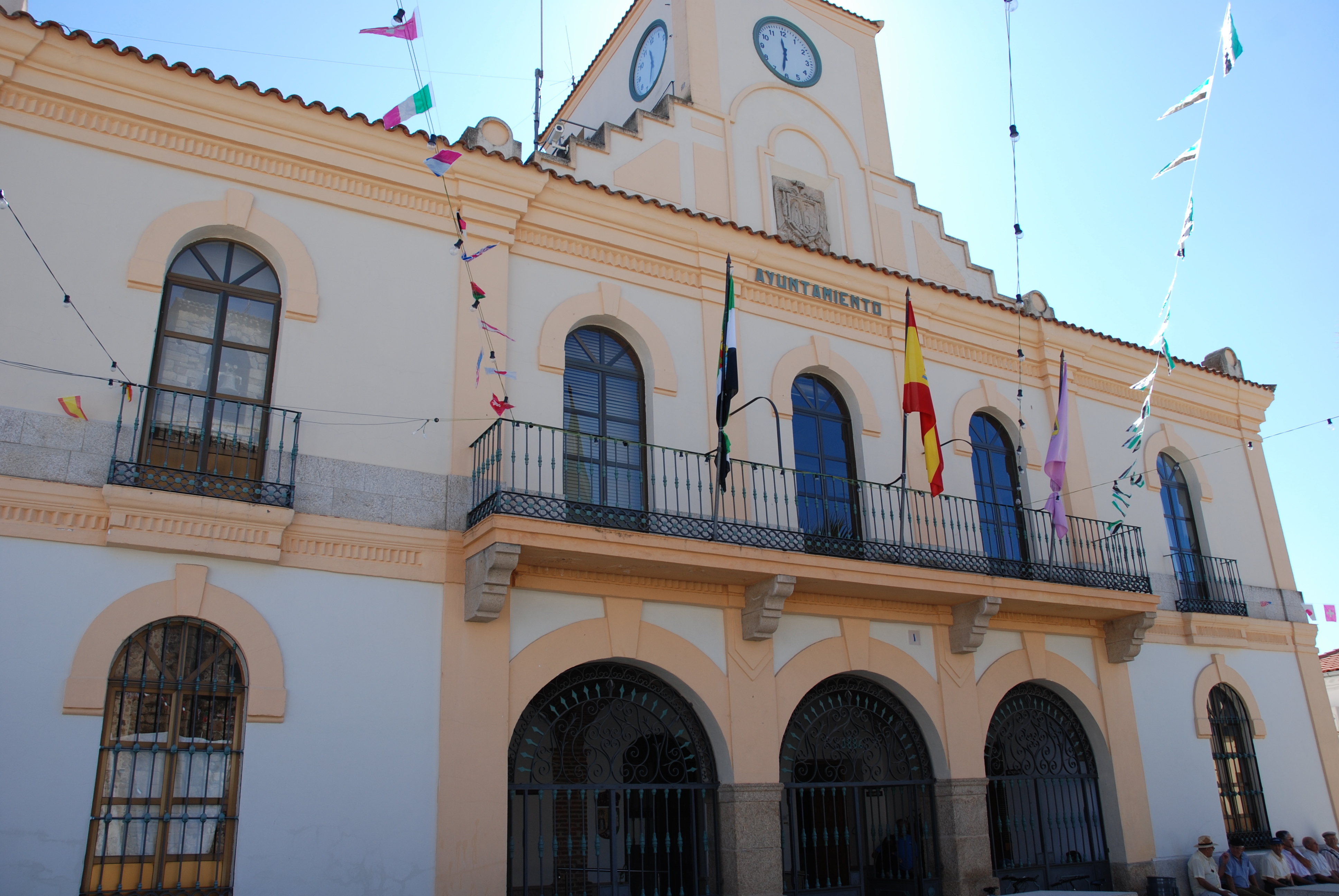 Ayuntamiento de Casatejada (Cáceres)